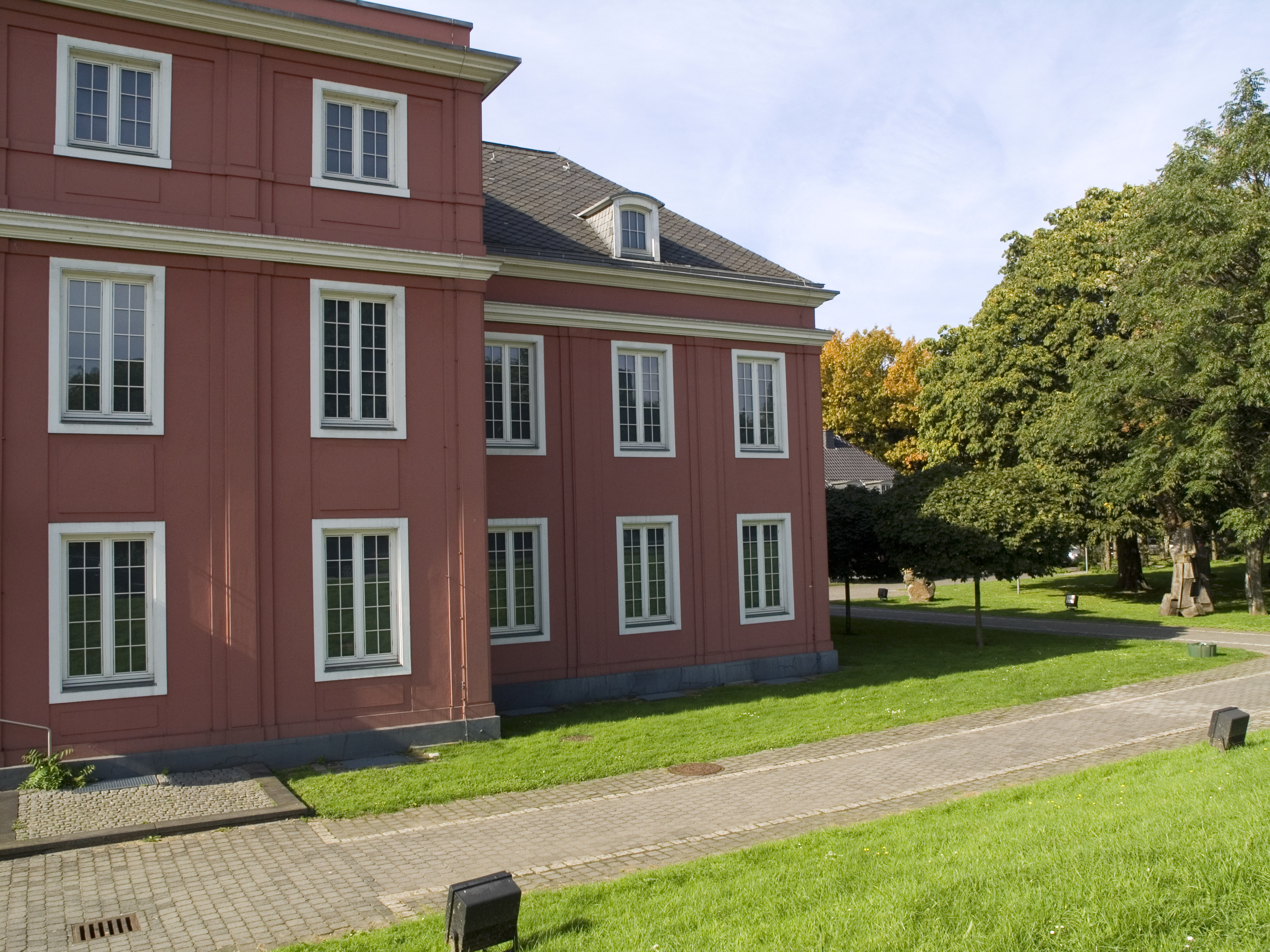 Северный Рейн-Вестфалия, Оберхаузен - замок Оберхаузен